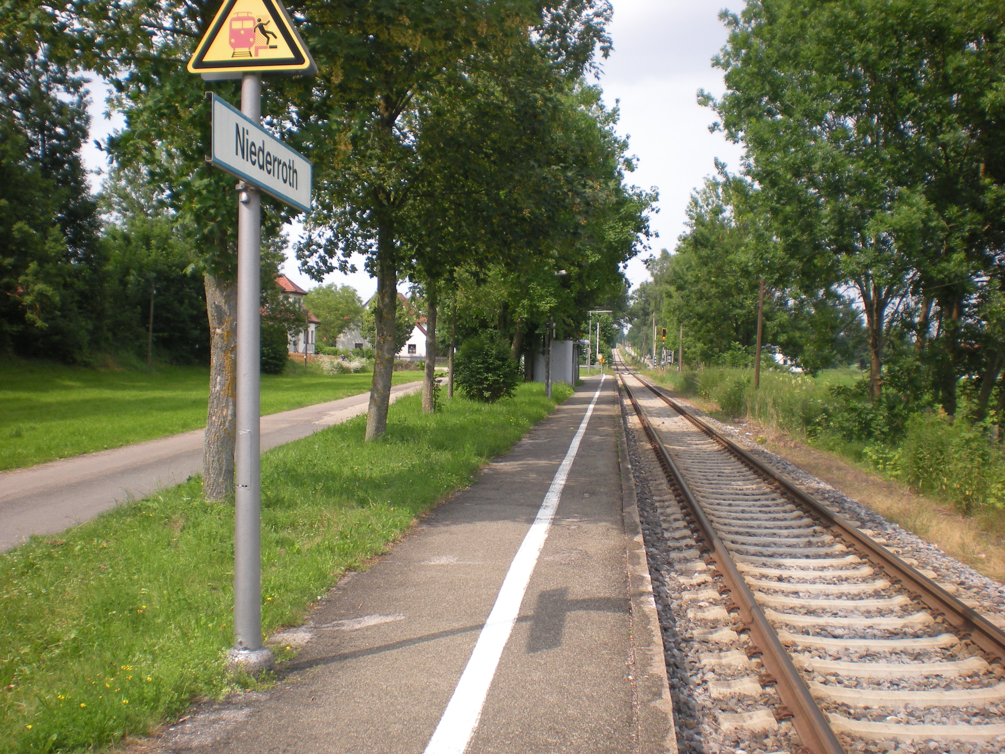 Seitenbahnsteig des Haltepunkts Niederroth an der Bahnstrecke Dachau–Altomünster (Linie A)